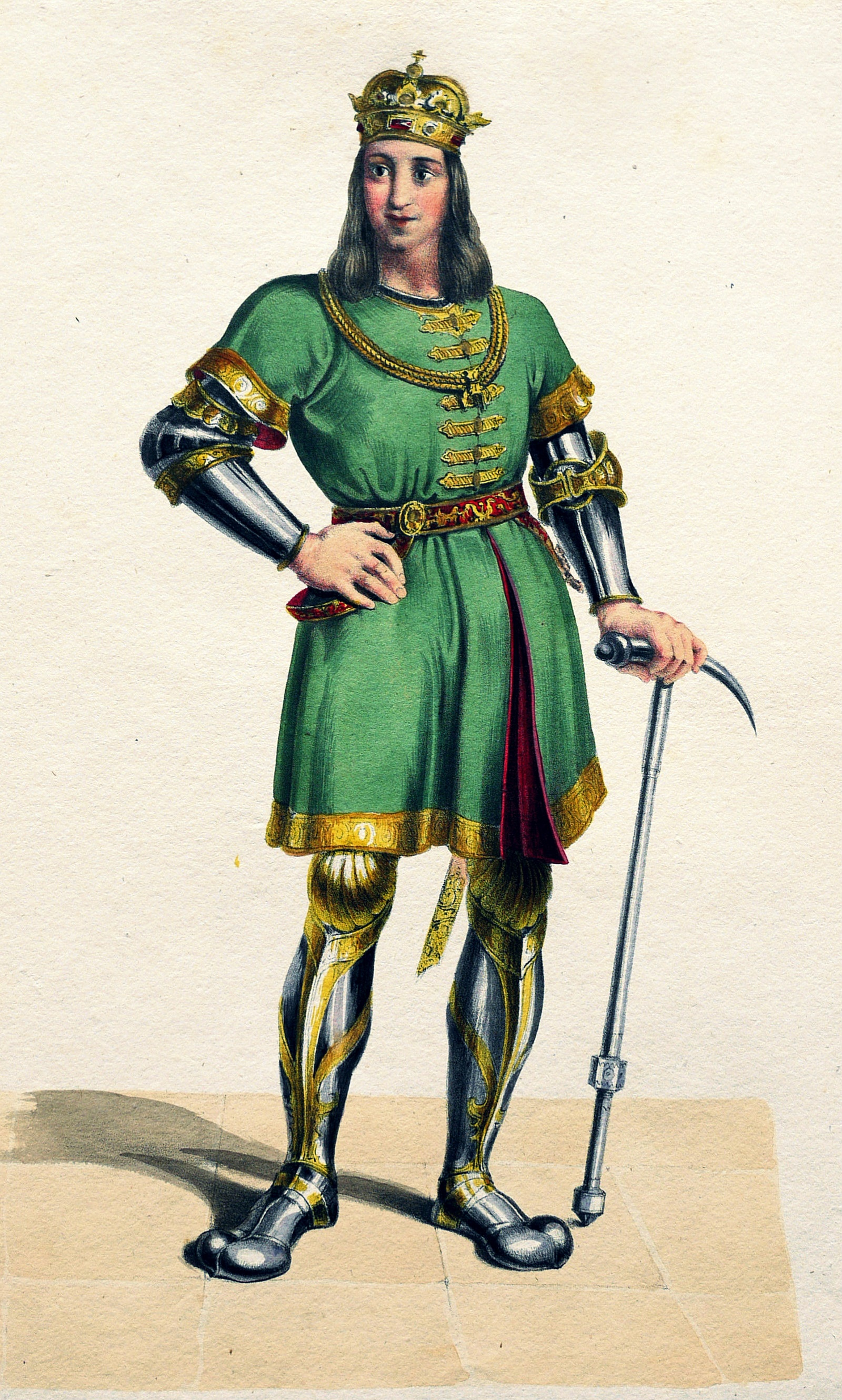 Ladislaus IV. (1262-1290), König von Ungarn etc.; Lithographie von Josef Kriehuber nach einer Zeichnung von Moritz von Schwind aus Ungerns Erste Heerführer Herzoge und Koenige In einer Reihe von Bildnissen von Bela bis auf Seine Majestät Franz I. Kaiser Von Österreich König Von Ungern &c., &c. Wien : Lithographisches Institut ;ca. 1828